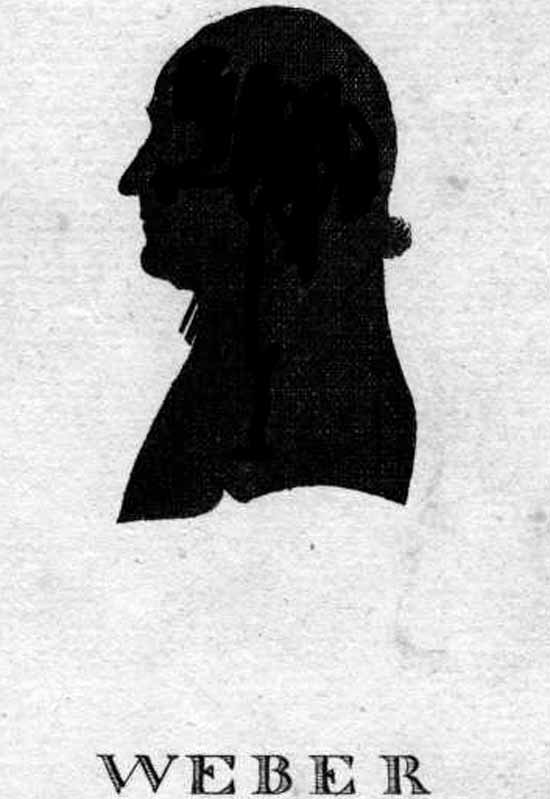 Scherenschnitt von Michael Weber (1752-1833), evangelischer Theologe